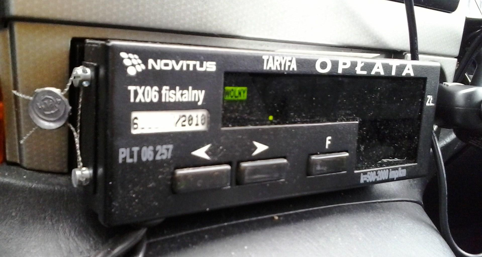 Polski taksometr elektroniczny.